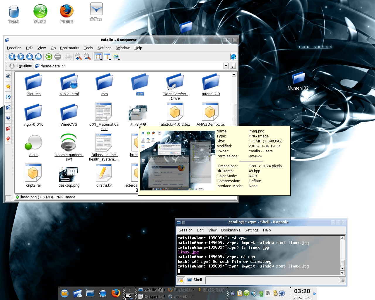 SUSE Linux, desktop KDE 3.4, rulând managerul de fişiere şi browserul de web Konqueror şi o consolă